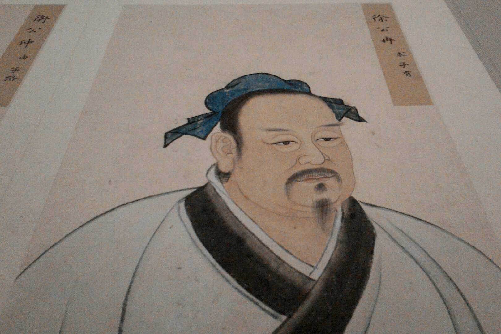 國立故宮博物院藏冉求像,台北市士林區陽明山次分區臨溪里